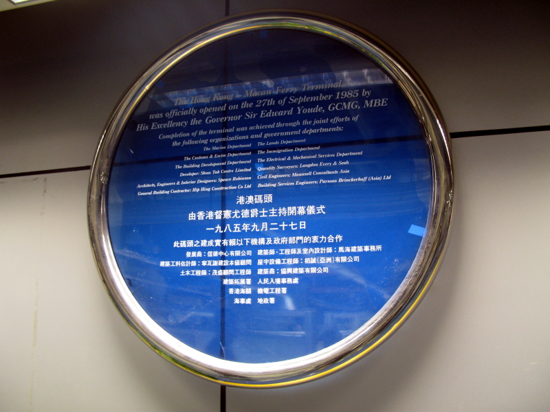 Hong Kong Macau Ferry Terminal Sign